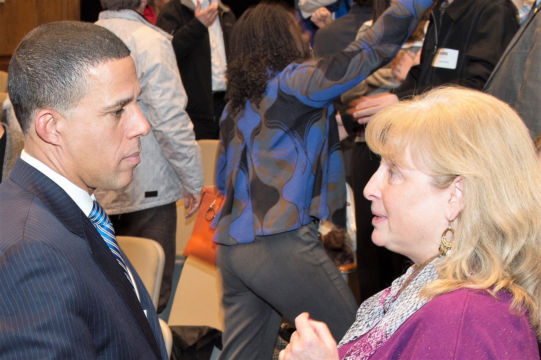 Lippenlesen von Lautzeichen (des Gesprochenen) durch eine Person mit Hörschädigung (hier beim „Deaf and Hard of Hearing Awareness Day“ 2013 in Annapolis in Maryland, USA).